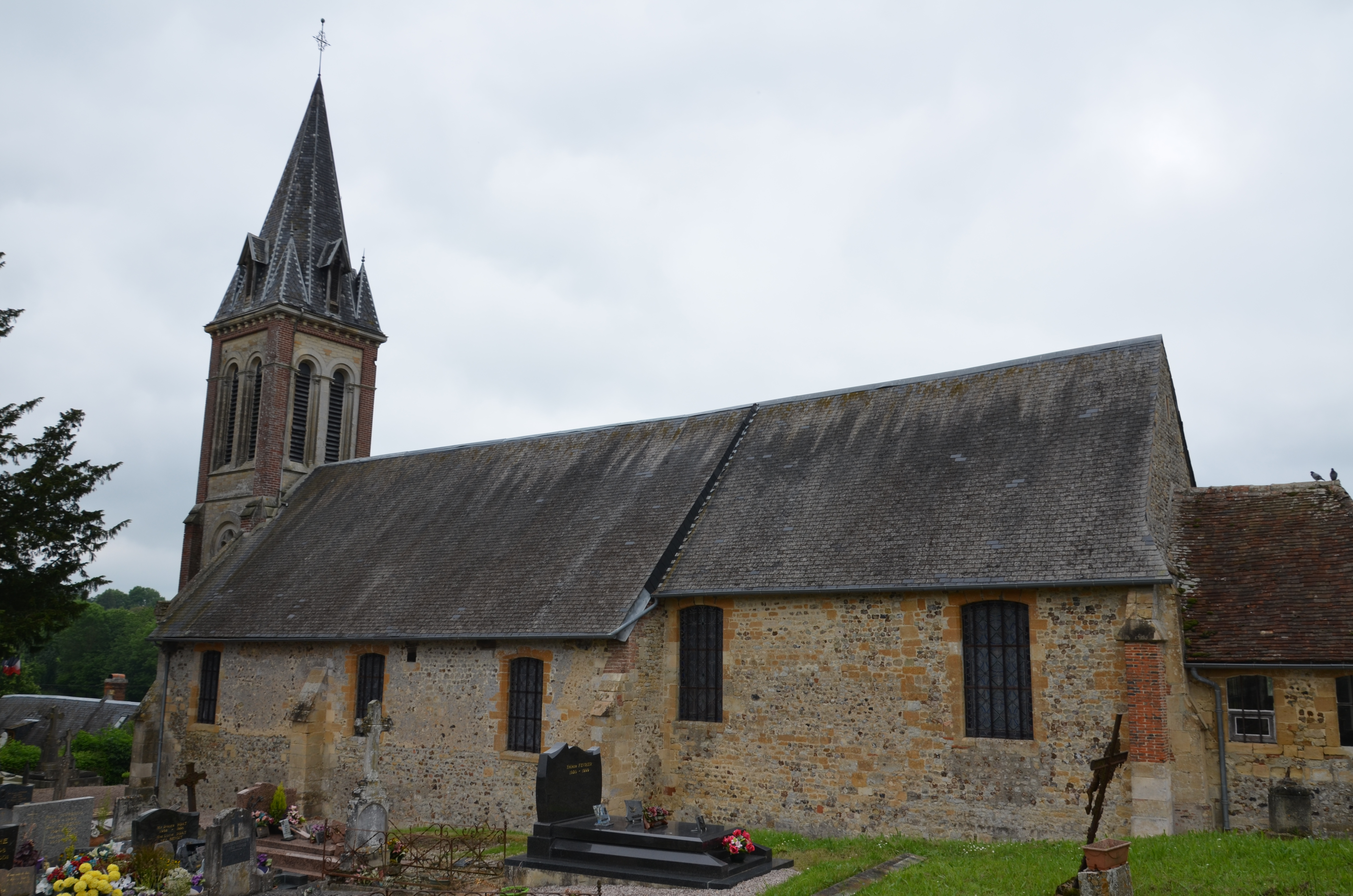 Église Notre-Dame de Montviette.